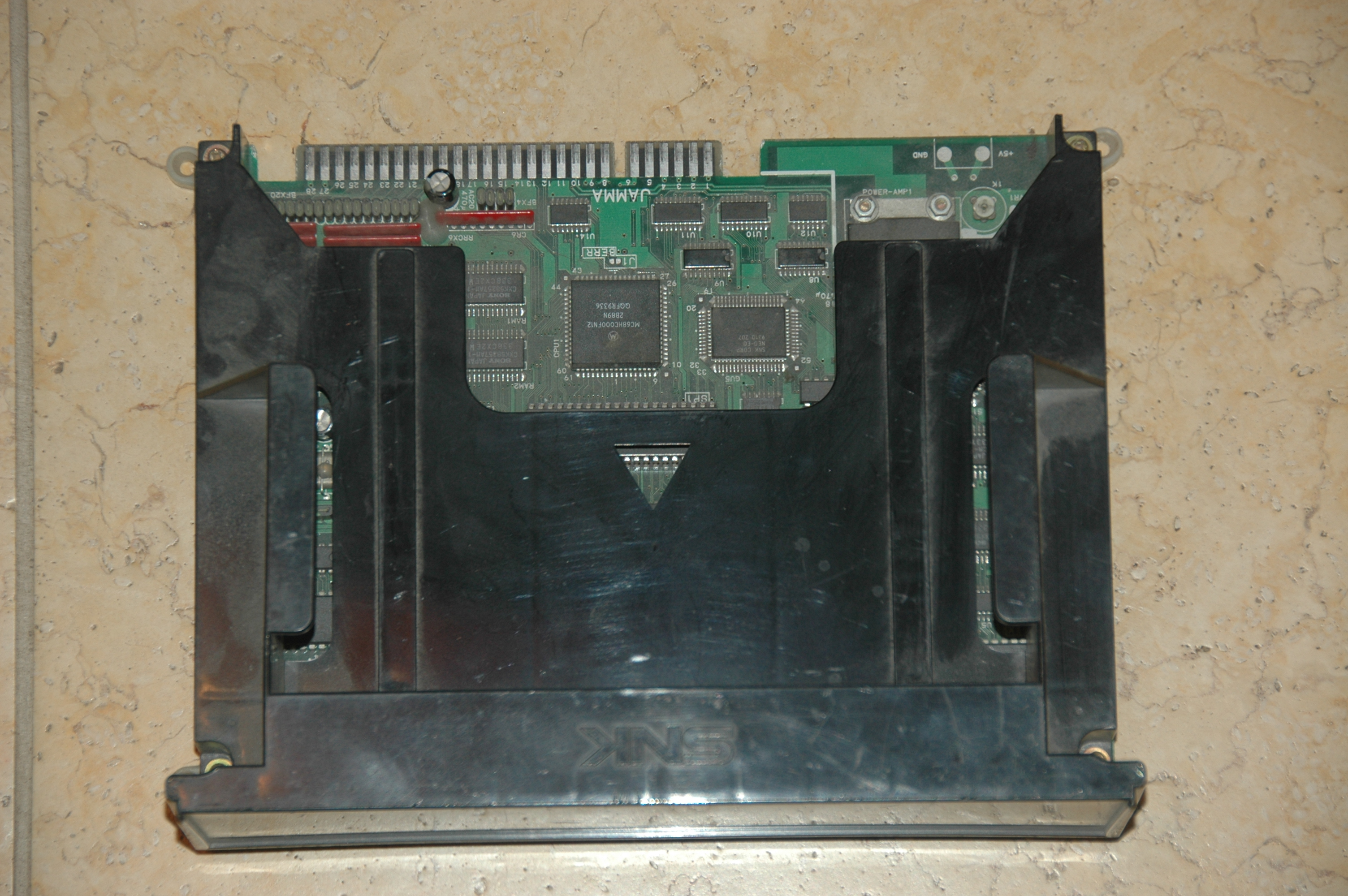 Una console da bar Neo Geo della SNK